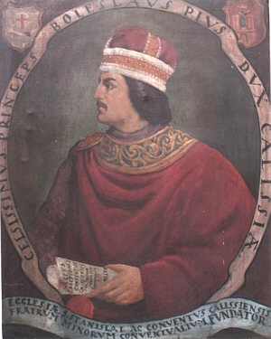 Portret Bolesława Pobożnego.